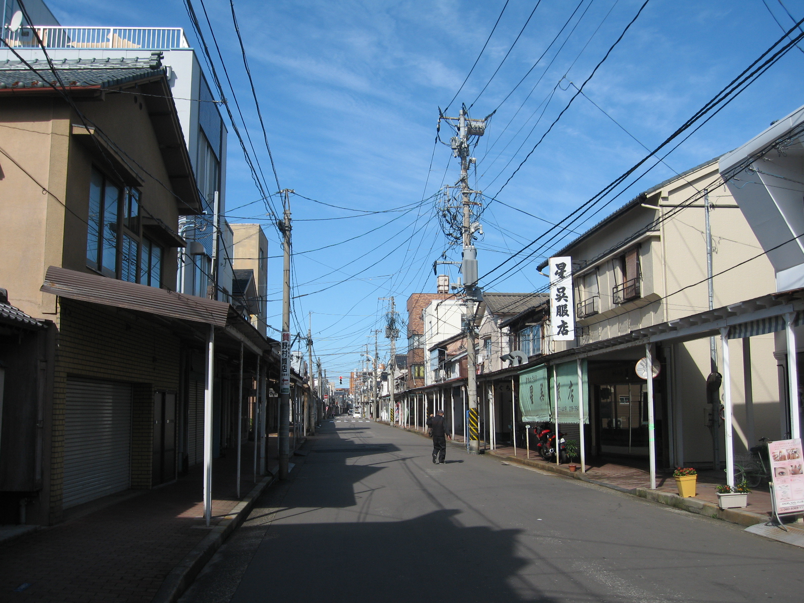 新潟県新潟市中央区。古町通10番町の画像。